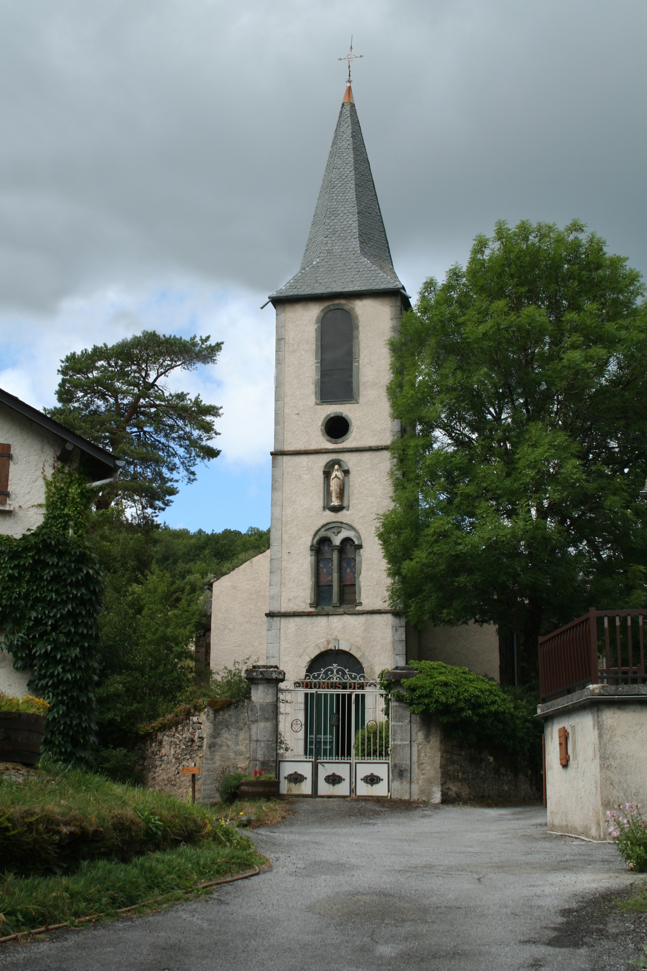 Gijounet (Tarn) - église Notre-Dame-de-l'Assomption.